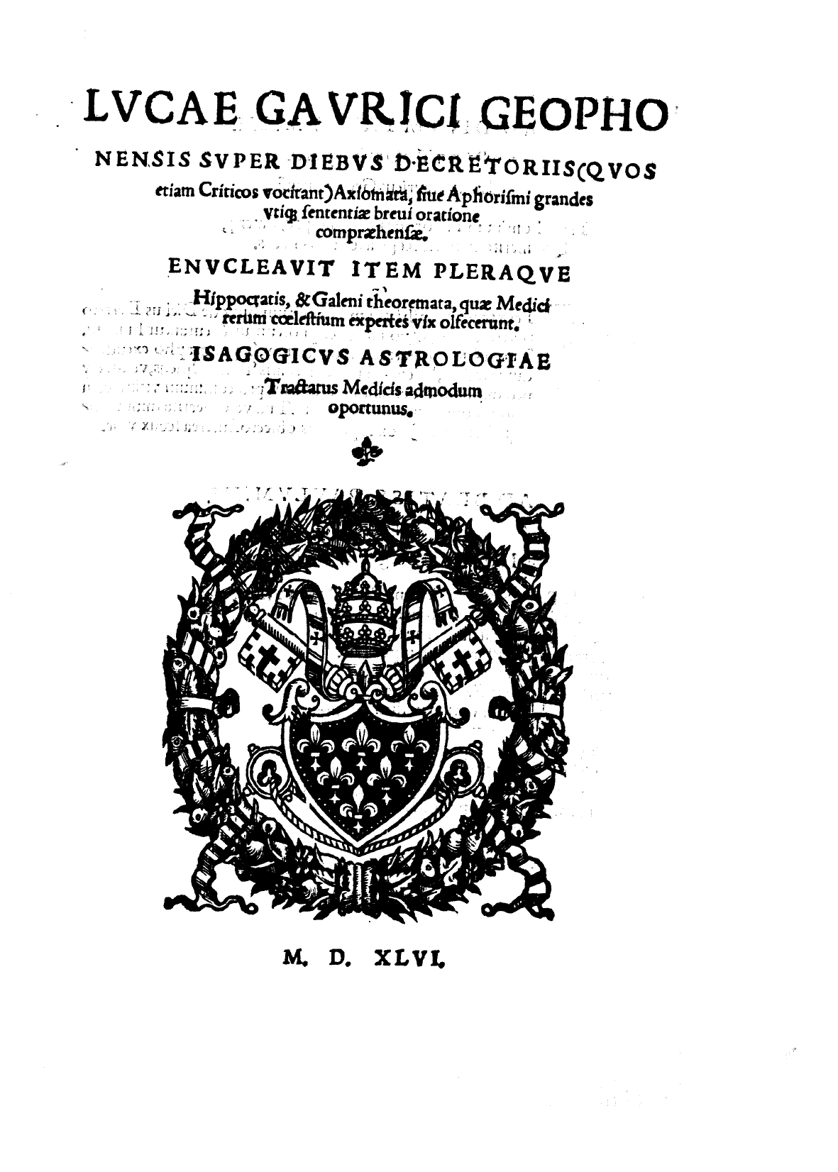 Lucae Gaurici Geophonensis Super diebus decretoriis (quos etiam criticos vocitant) axiomata, siue Aphorismi grandes vtique sententiae breui oratione compraehensae. Enucleauit item pleraque Hippocratis, & Galeni theoremata, quae medici rerum coelestium expertes vix olfecerunt. Isagogicus astrologiae tractatus medicis admodum oportunus. - (Impressum Romae) : [s.n.], 1546 (in aedibus Valerij Dorici, & Ludouici, fratris, Brixianorum, anno ... 1546). - 136 [i.e. 138], [2] p. : ill. ; fol. - Contiene anche, a p. 114 : Hippocratis Libellus de somniis aegrotantium .